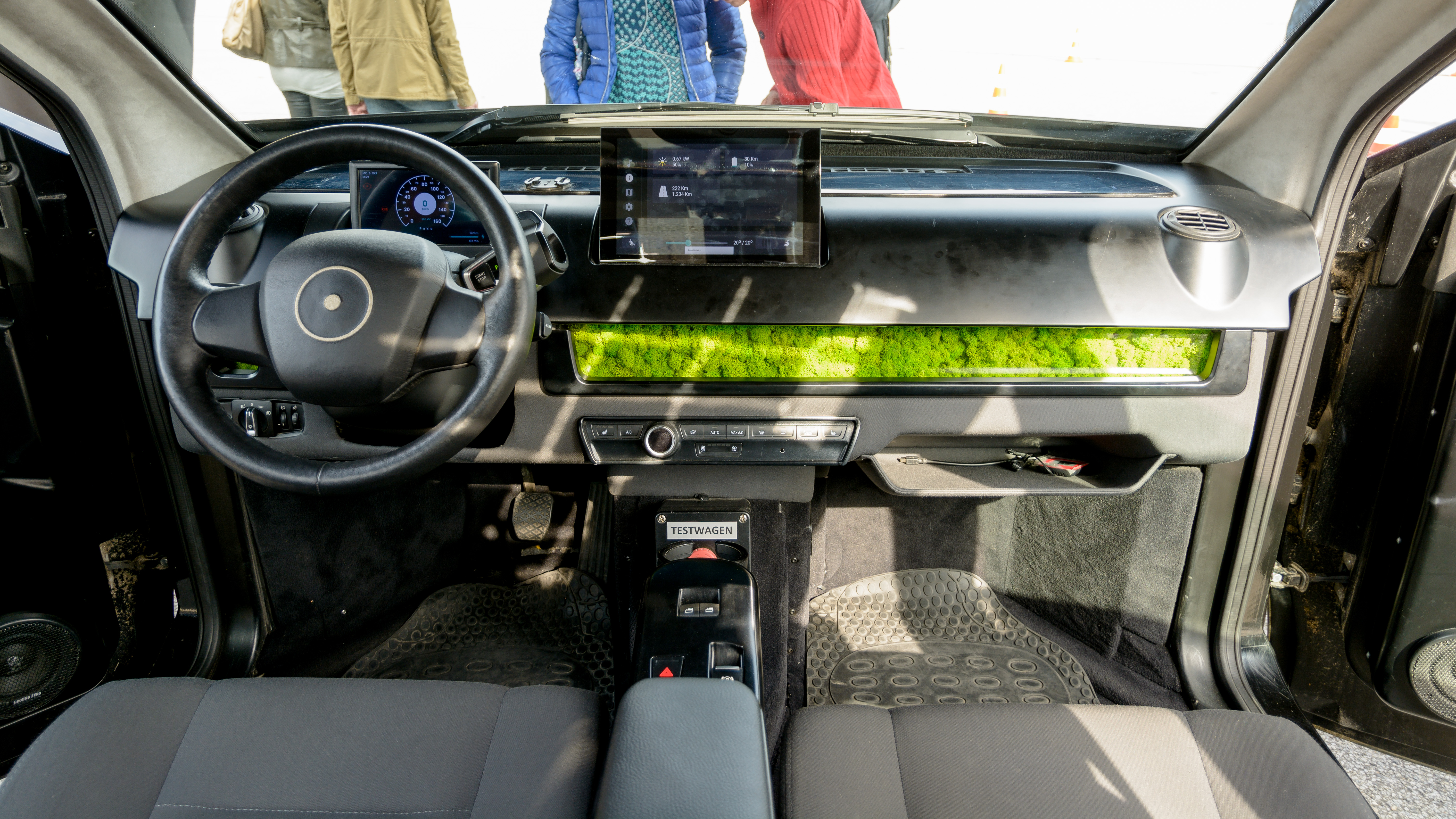 Sono Motors Testfahrten mit Sion Prototyp in Passau